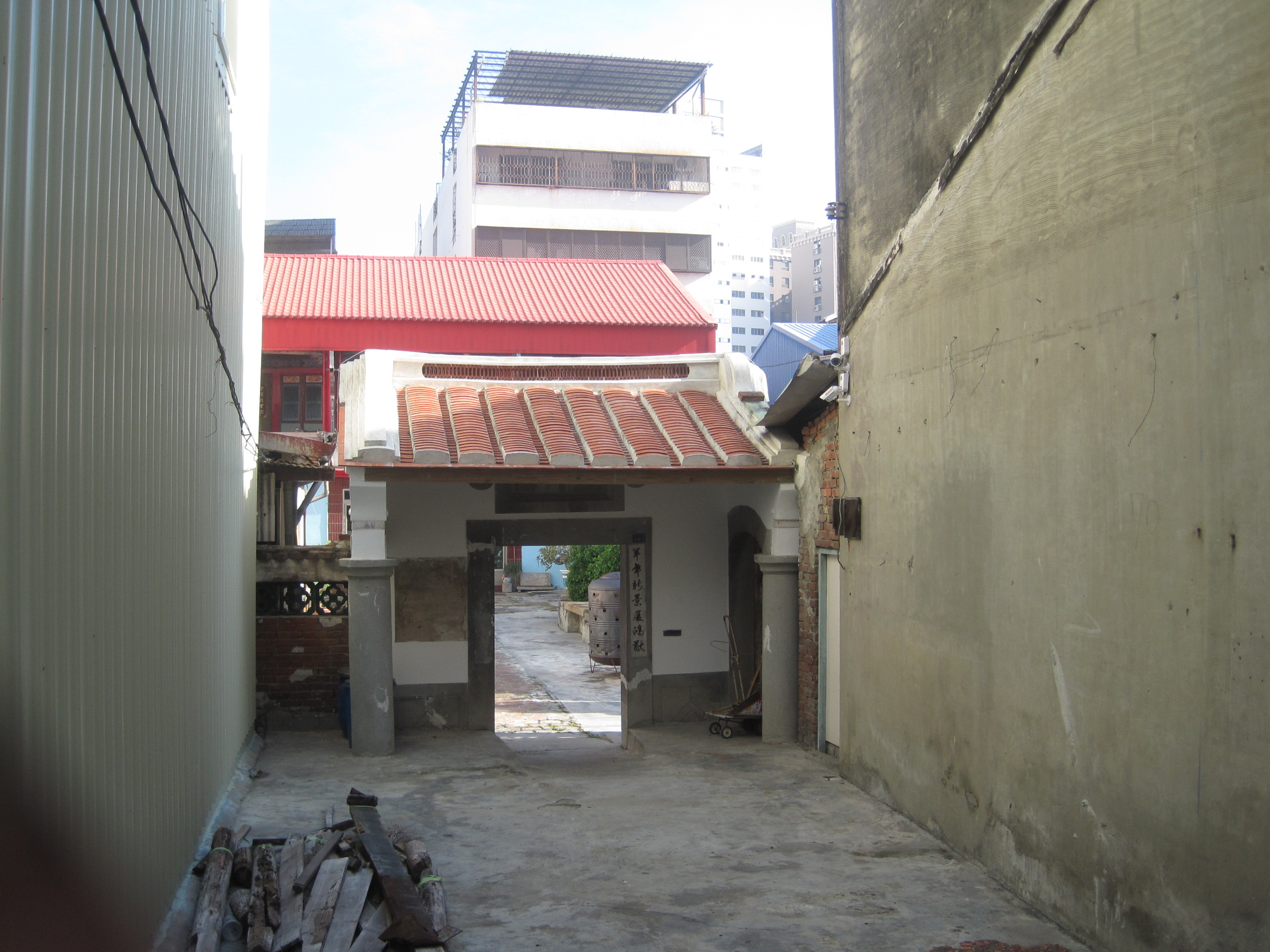 西德堂，臺南市文化資產